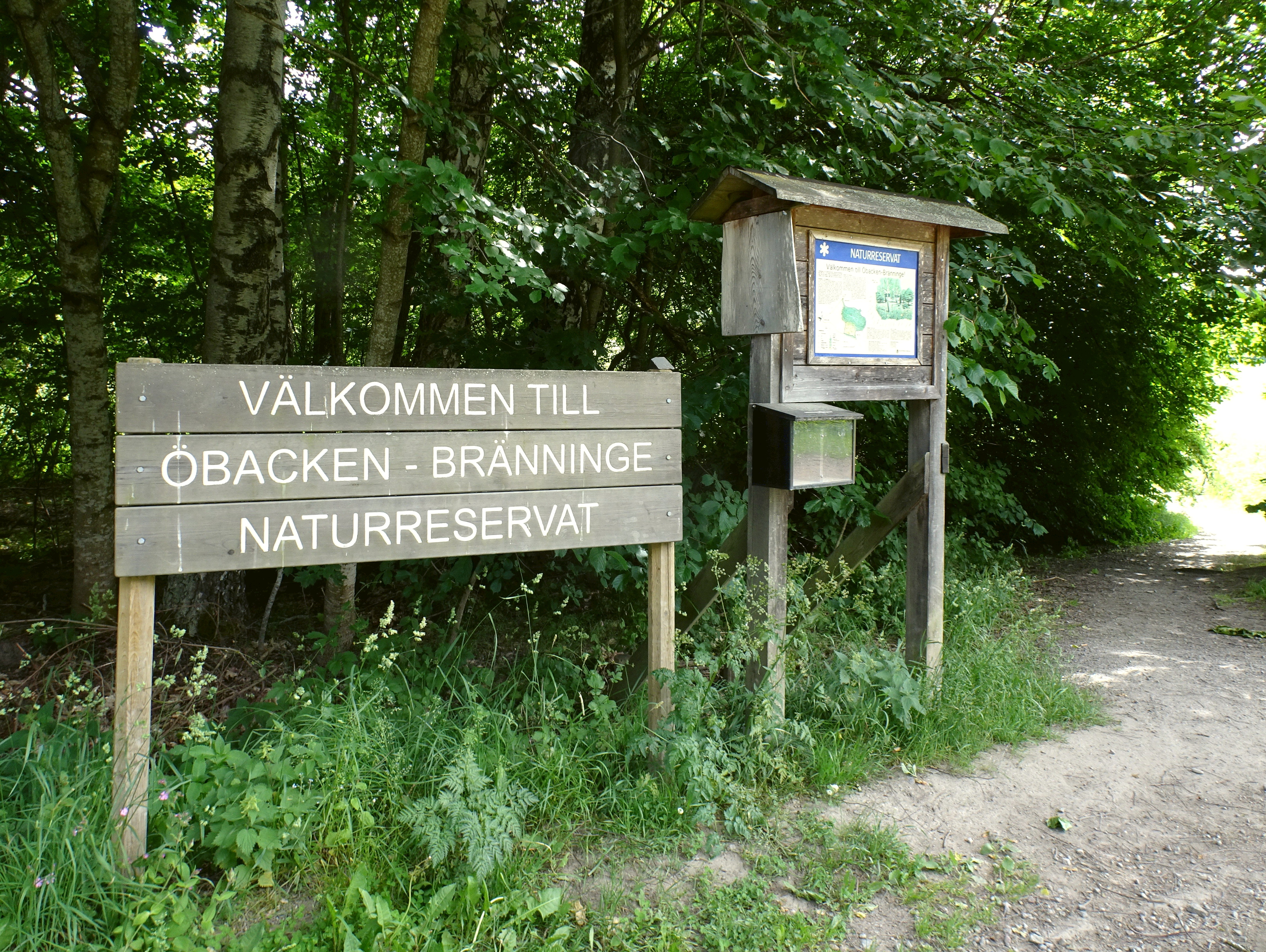 Öbacken-Bränninge naturreservat entré